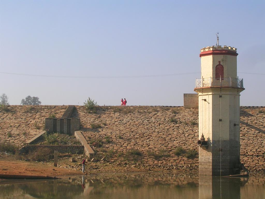 Hessarghatta Bangalore, 2007